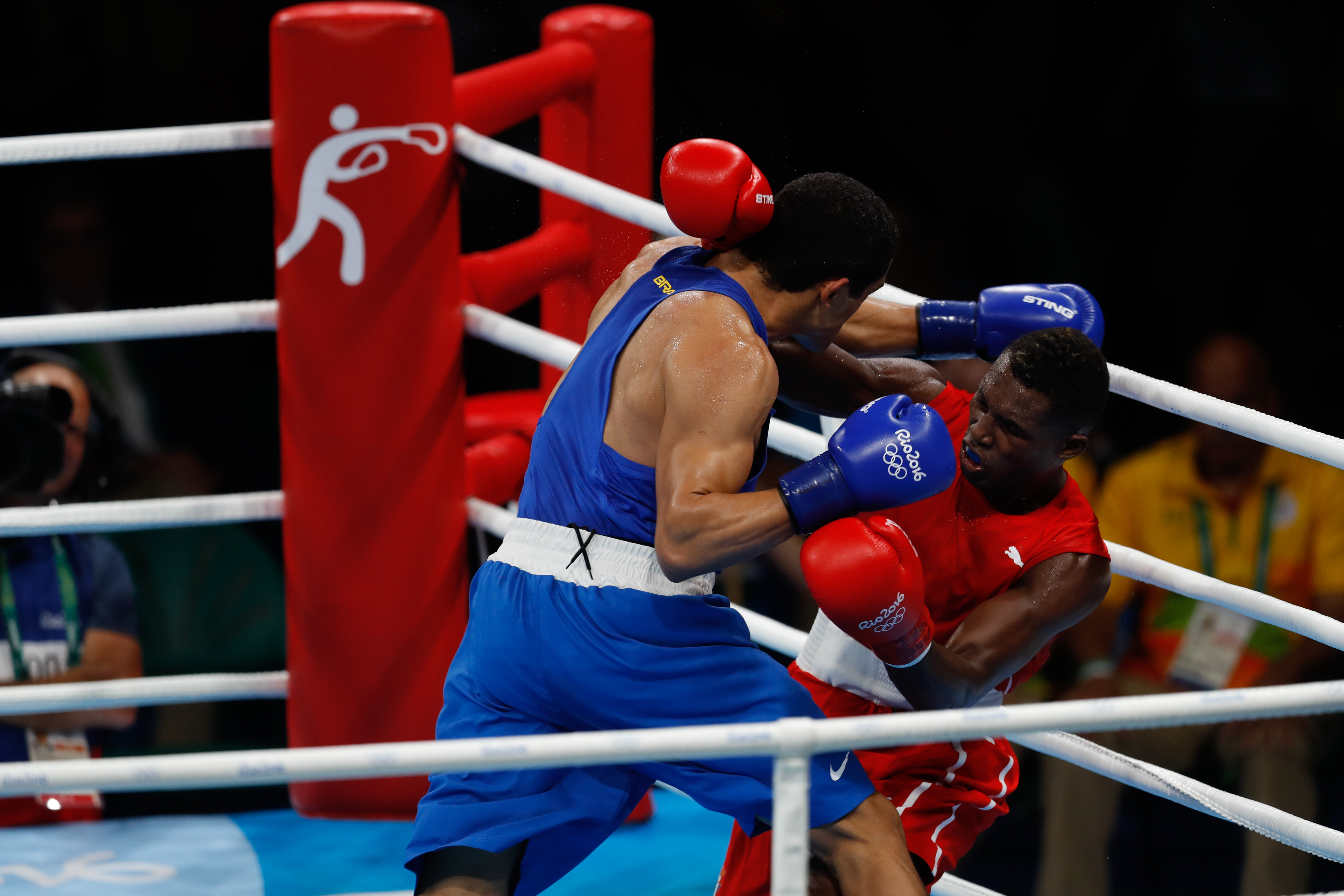 Rio de Janeiro - O brasileiro Michel Borges, foi derrotado pelo cubano Julio Cesar la Cruz, nas quartas de final da categoria at 81kg. (Fernando Frazão/Agência Brasil)